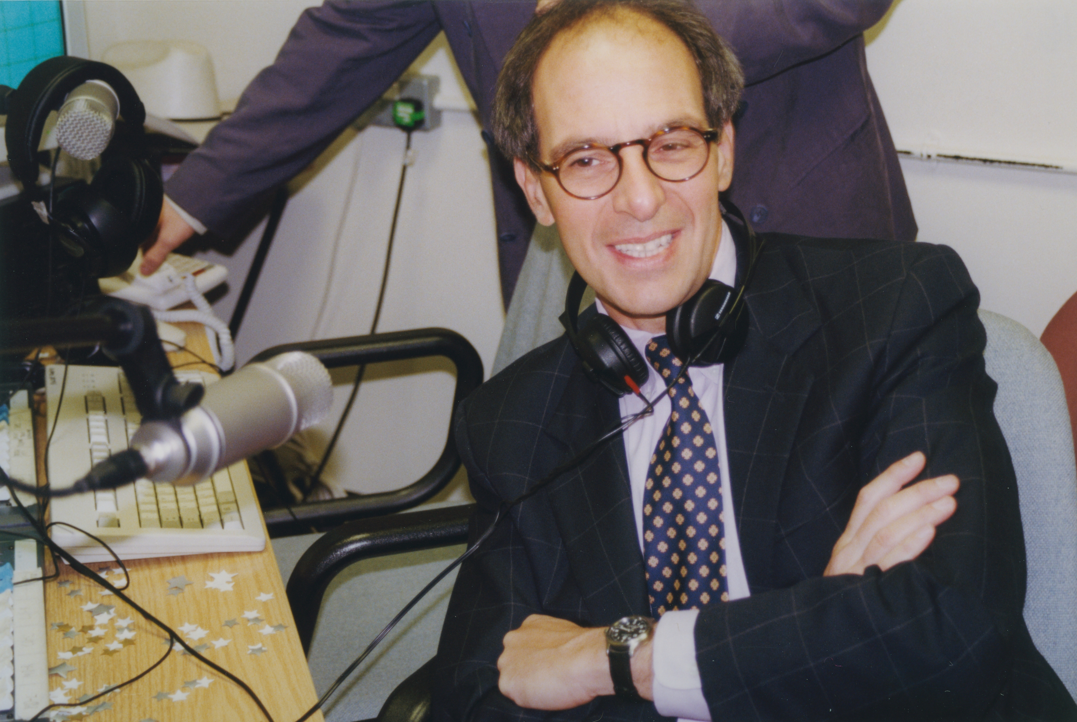 IMAGELIBRARY/885 Persistent URL